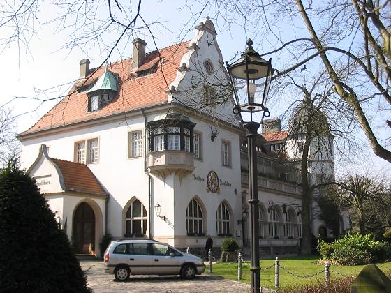 Grunewaldsee, Berlin (Gasthaus Paulsborn)